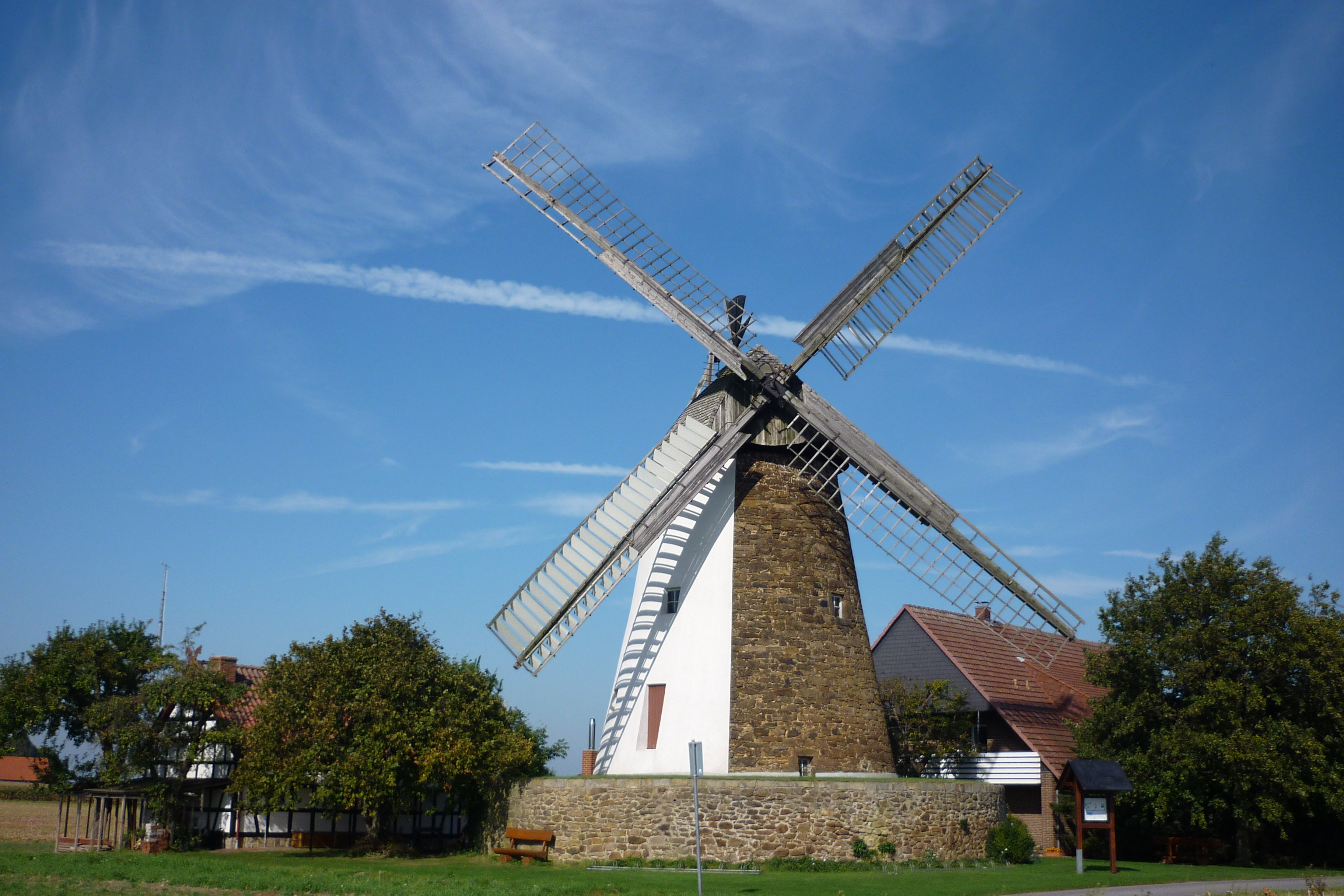 Hille. Storck's Windmühle in Eickhorst. This image shows a heritage building in Germany, located in the North Rhine-Westphalian city Hille (no. 10).